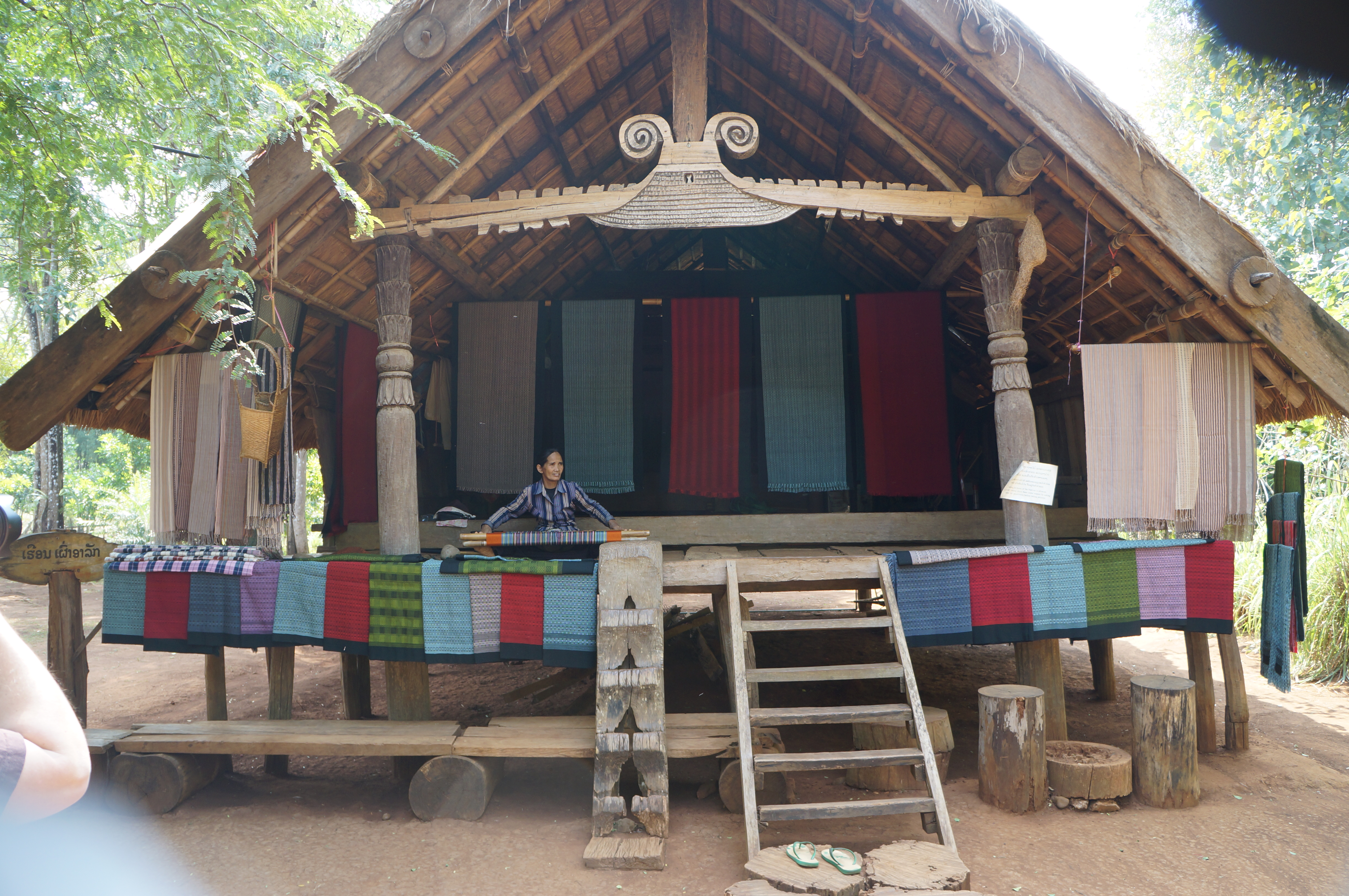 Laos, Village des tisserands de Ban Lao Ngam le Plateau des Boloven